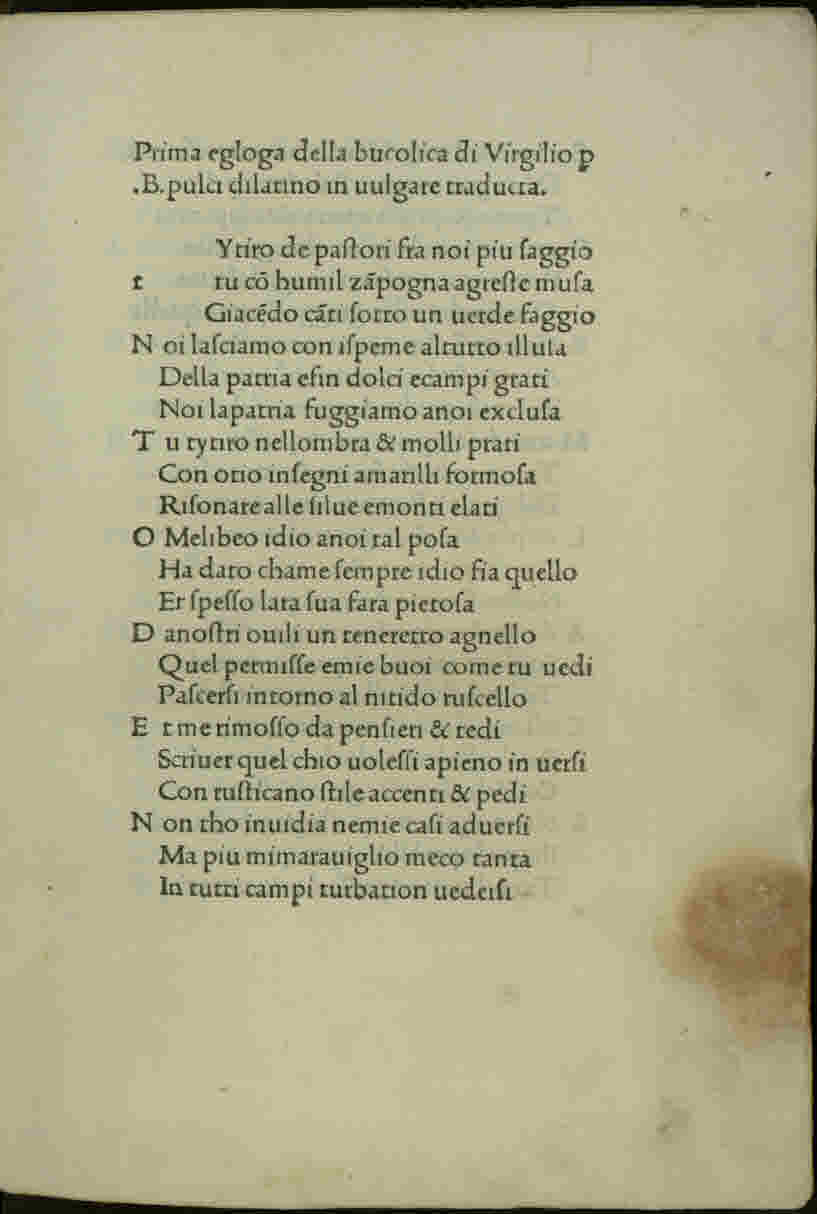 Bucolica (italiano). Segue: Francesco Arzocchi: Bucolica (italiano); Bernardo Pulci: Elegia a Lorenzo de’ Medici; Bernardo Pulci: Elegia a Giuliano de’ Medici; Sonetto; Girolamo Benivieni: Bucolica (italiano); Jacopo Fiorino de' Buoninsegni: Bucolica (italiano). - Impressum Florentiae : per me Antonium Bartholomei Miscomini, A. D. MCCCCLXXXI die ultimi februarii. - 124 c. ; a-e⁸, f⁶, g-p⁸, q⁶ ; 4º .